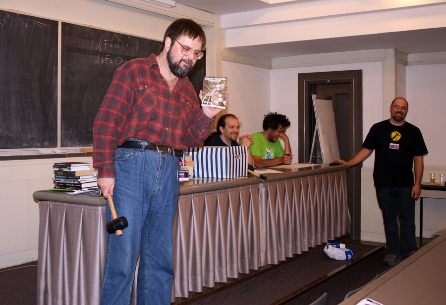 Sferakon 2011.